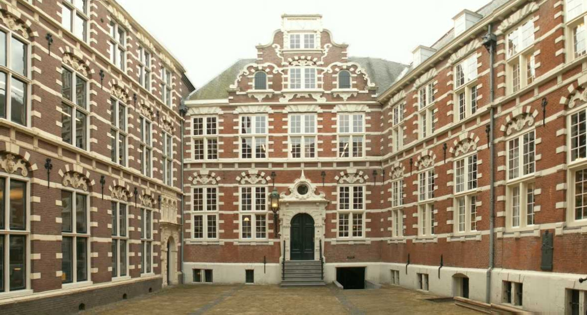 Eigen opname 16-11-2007, gecompileerd 18-11-2007 (het is een panoramafoto omdat ik het er anders niet op kon krijgen wegens gebrek aan voldoende groothoek). Te zien is de binnenplaats van het VOC-huis te Amsterdam (hoek Kloveniersburgwal en Oude Hoogstraat) gezien vanaf de ingang Oude Hoogstraat.